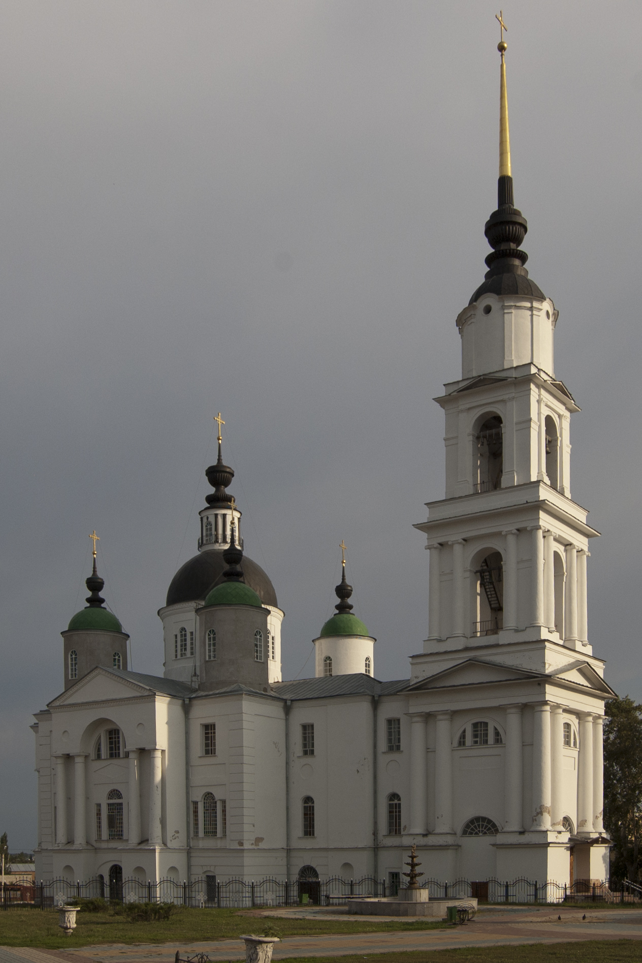 великолепное сооружение, одно из красивейших в Чаплыгине.